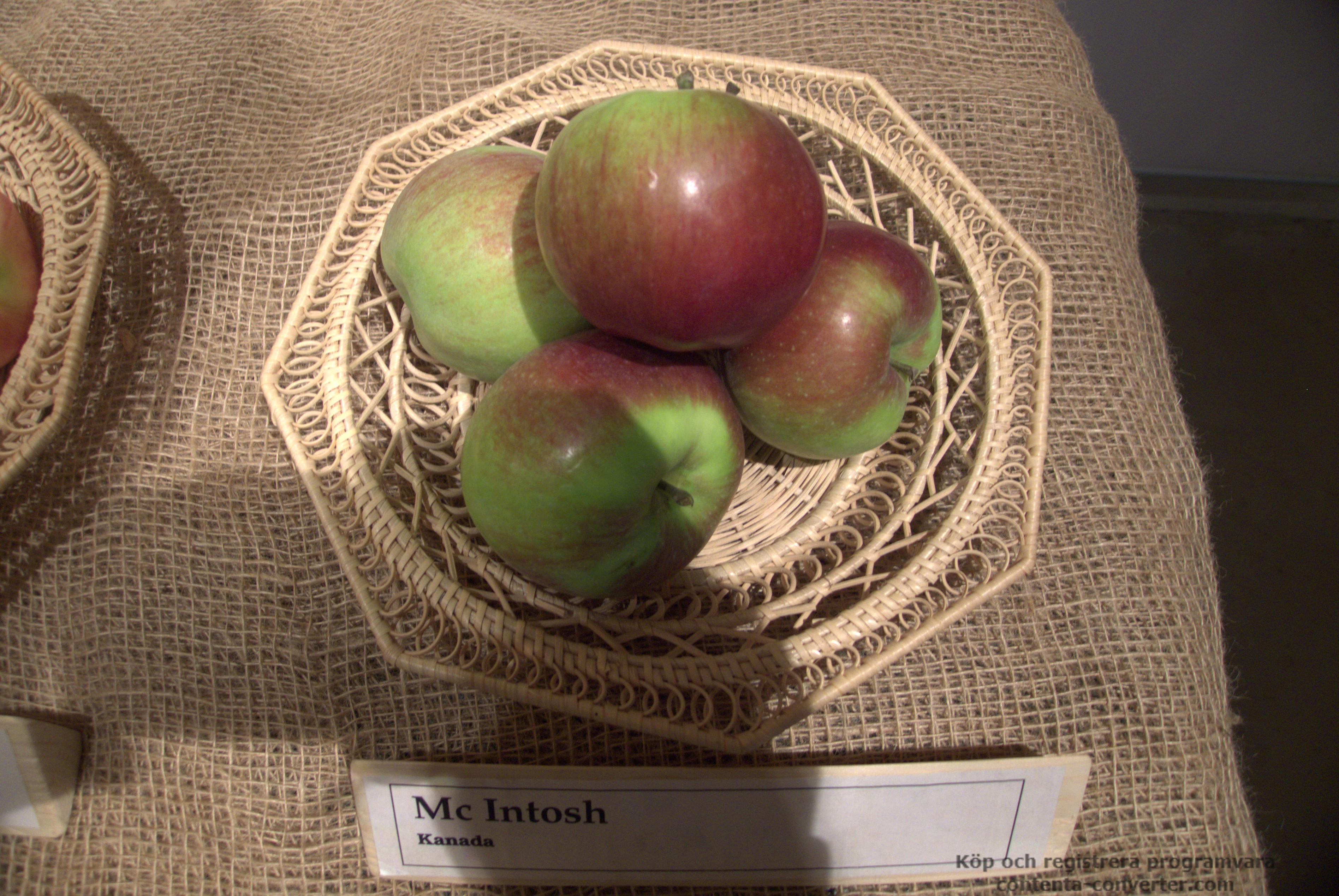 Äpplen av sorten